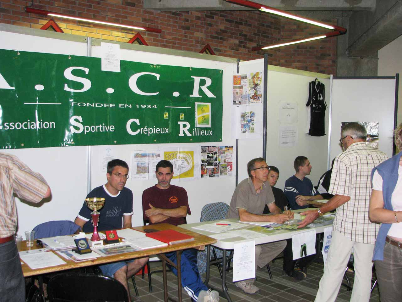 Journée des associations avec la participation de l'Association Sportive de Crépieux-Rillieux